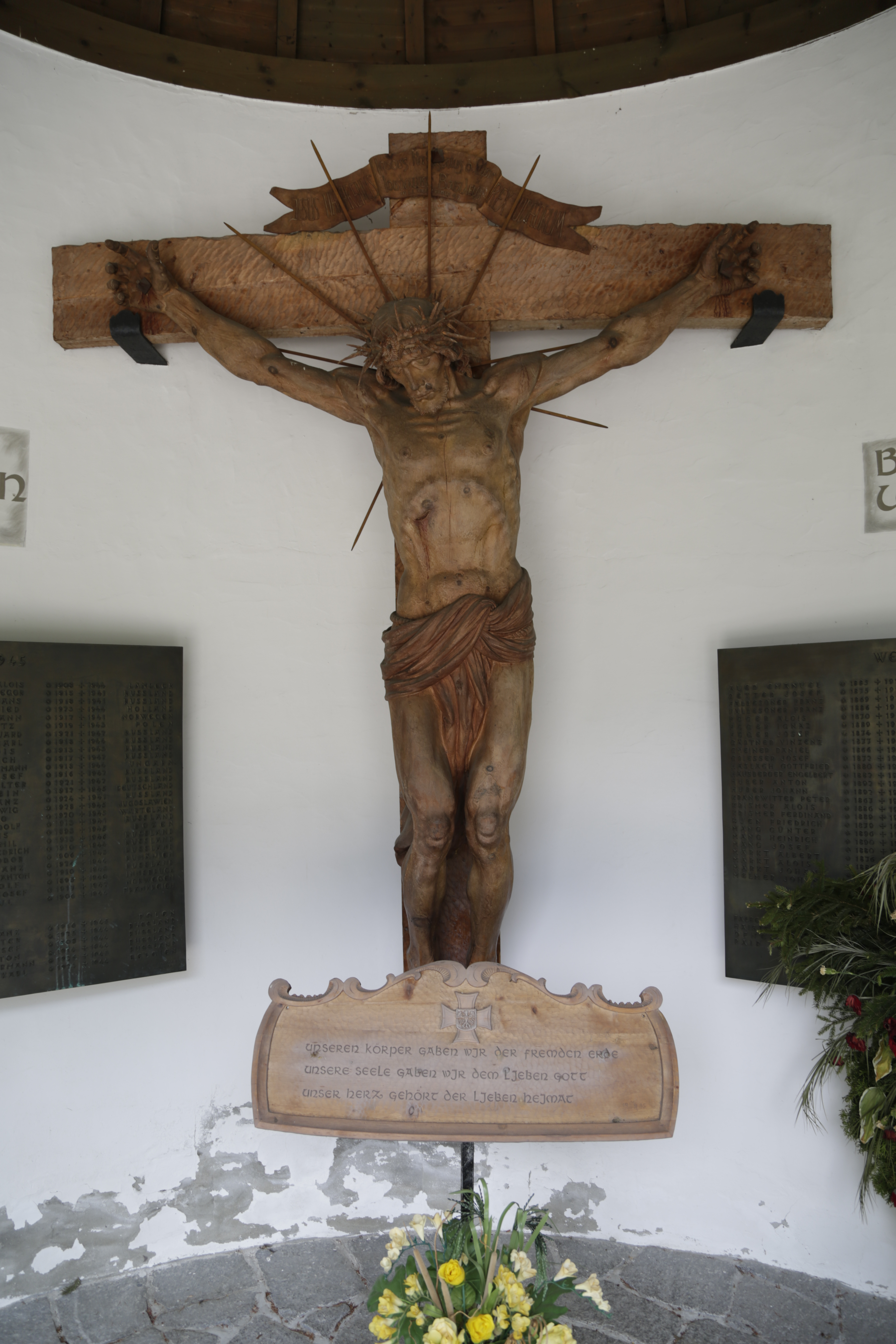 Das Kriegerdenkmal von Nassereith befindet sich auf dem Friedhof von Dormitz. Es ist denkmalgeschützt.